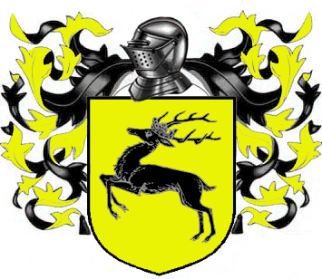 Estandarte creado con photoshop usando material libre o creado ex profeso por mi e inspirado por las obras de Canción de Hielo y Fuego.